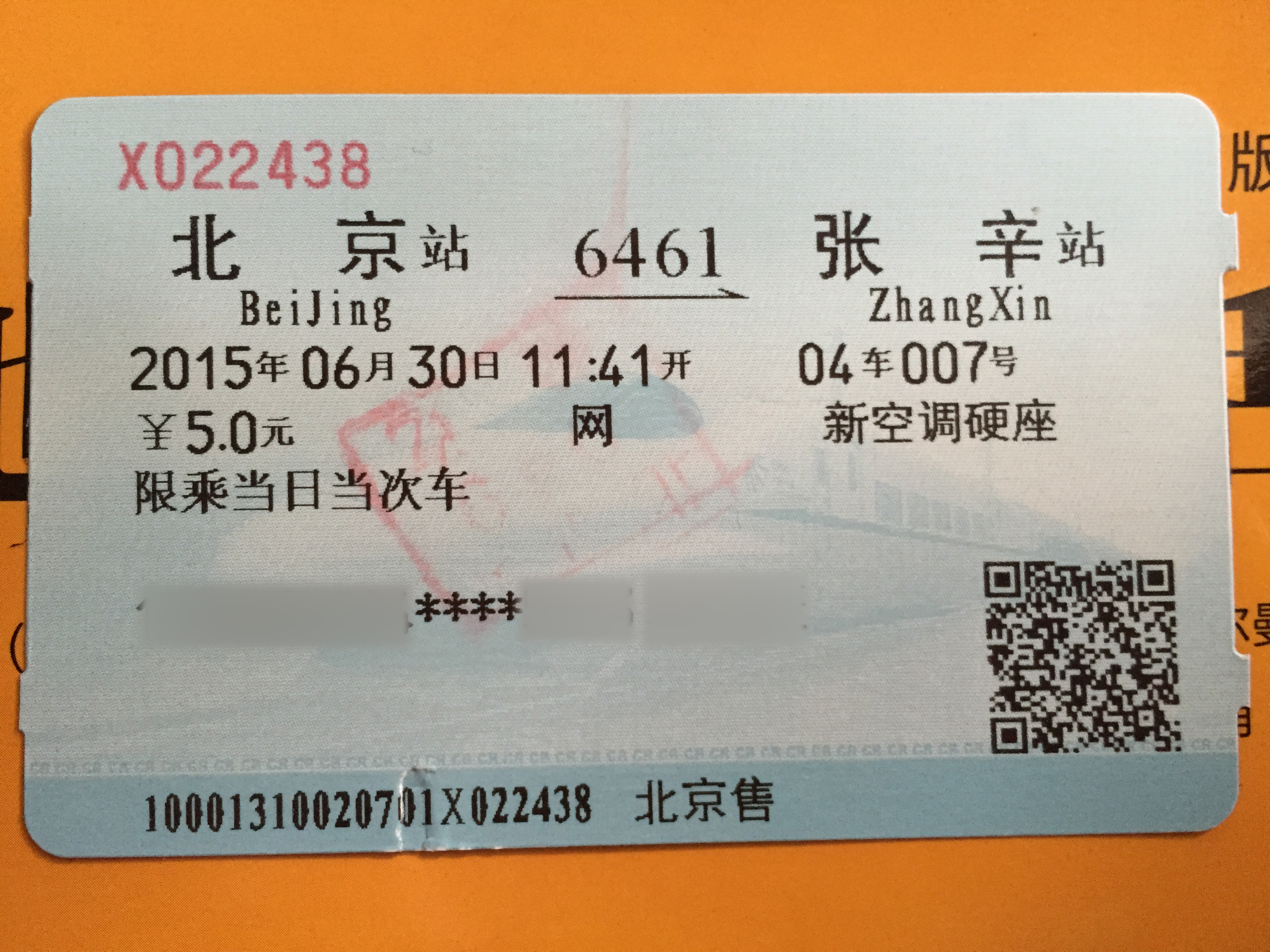 更换排版后的6461次列车车票（北京-张辛），北京站取票机出票